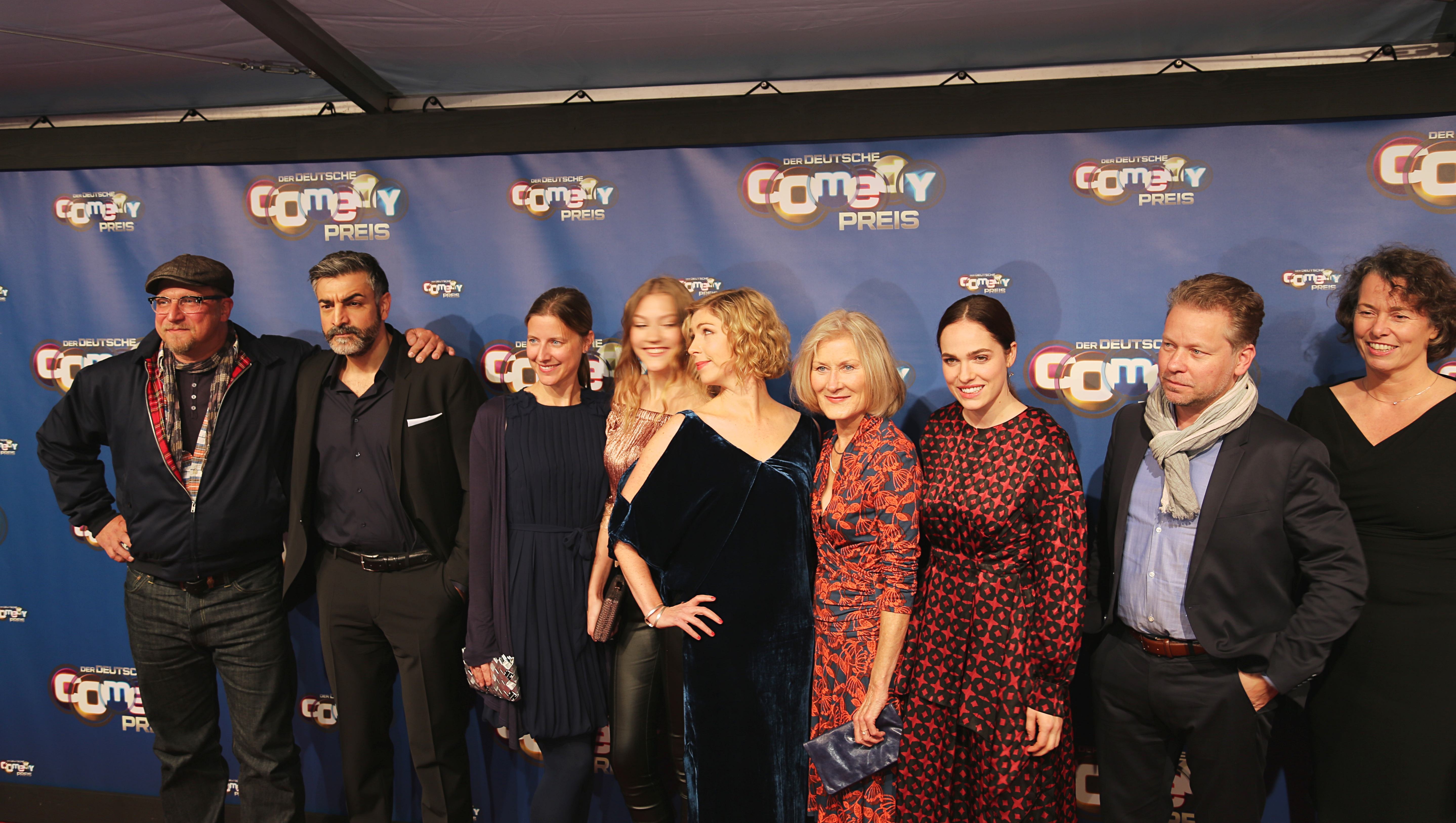 Der Cast und Mitglieder der Produktion von "Magda macht das schon" beim Deutschen Comedypreis 2017 (v. l.): Matthias Komm, Neil Malik Abdullah, Ursula Pfriem (ausführende Produzentin), Charlotte Krause, Brigitte Zeh, Hedi Kriegeskotte, Verena Altenberger, Sebastian Andrae (Drehbuch), Beatrice Kramm (Produzentin).